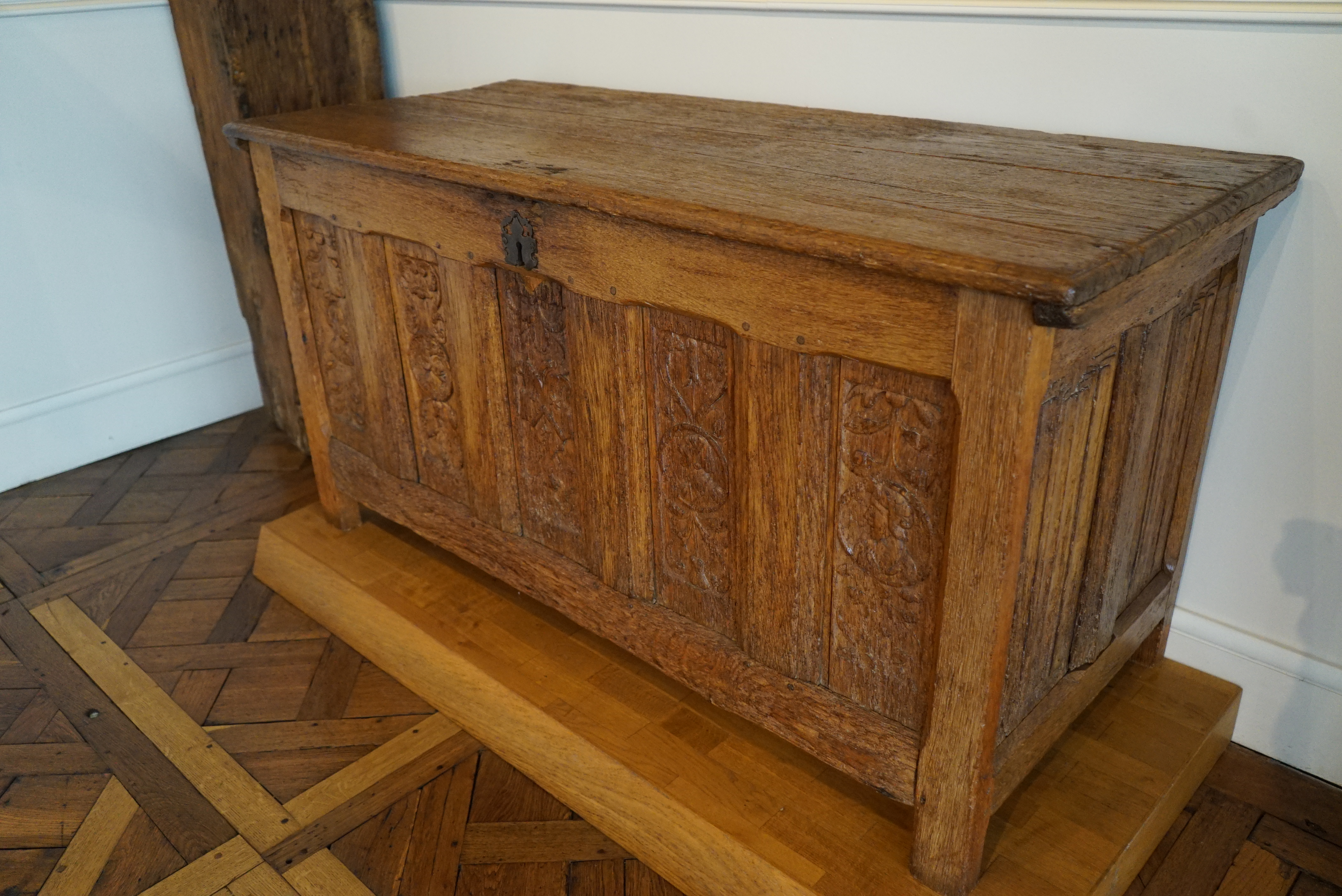 description cf titre